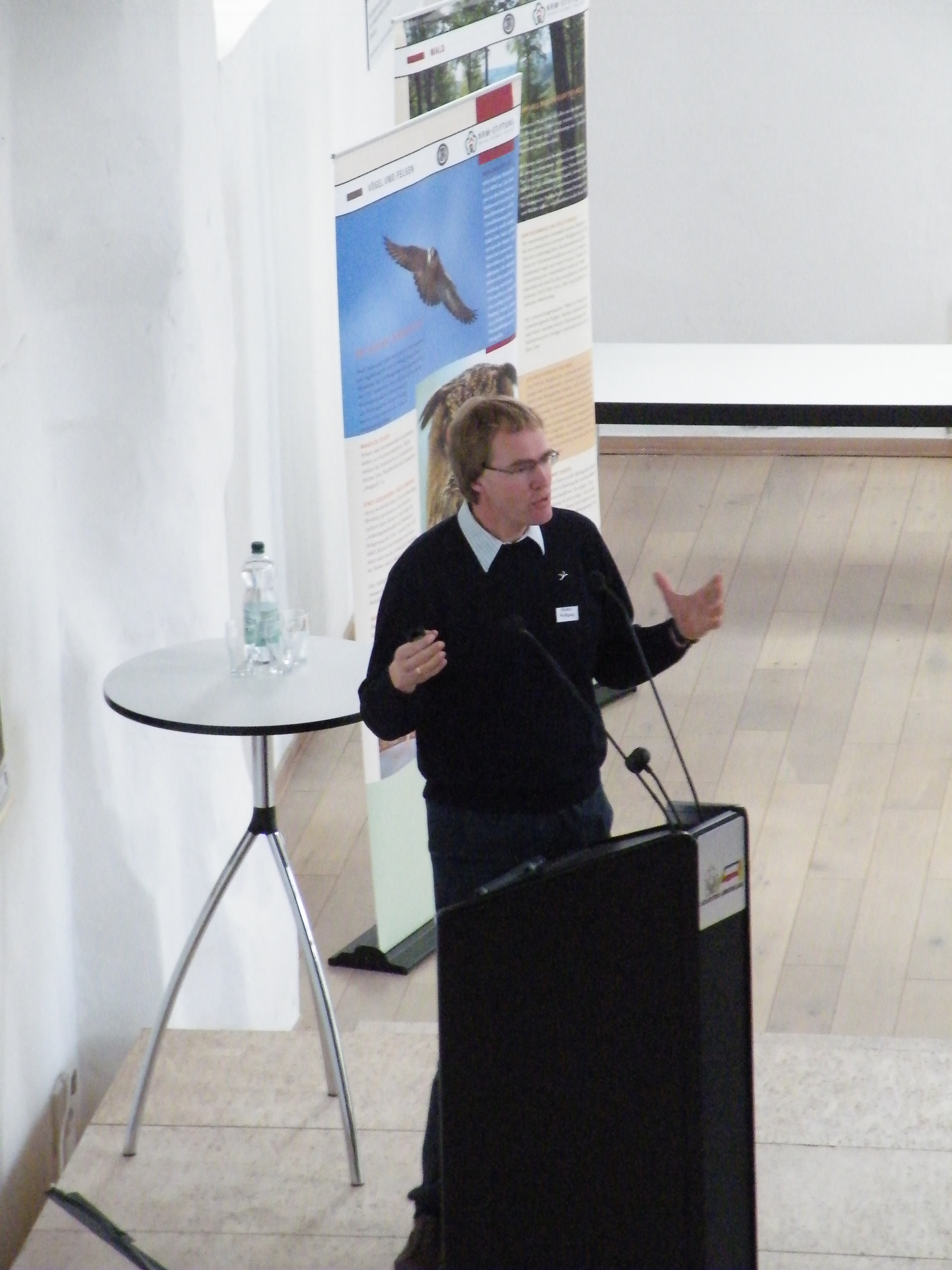 Wolgang Fiedler bei Vortrag auf der Jahrestagung der AG Eulen im Kloster Bredelar, welche vom Verein für Natur- und Vogelschutz im Hochsauerlandkreis ausgerichtet wurde.